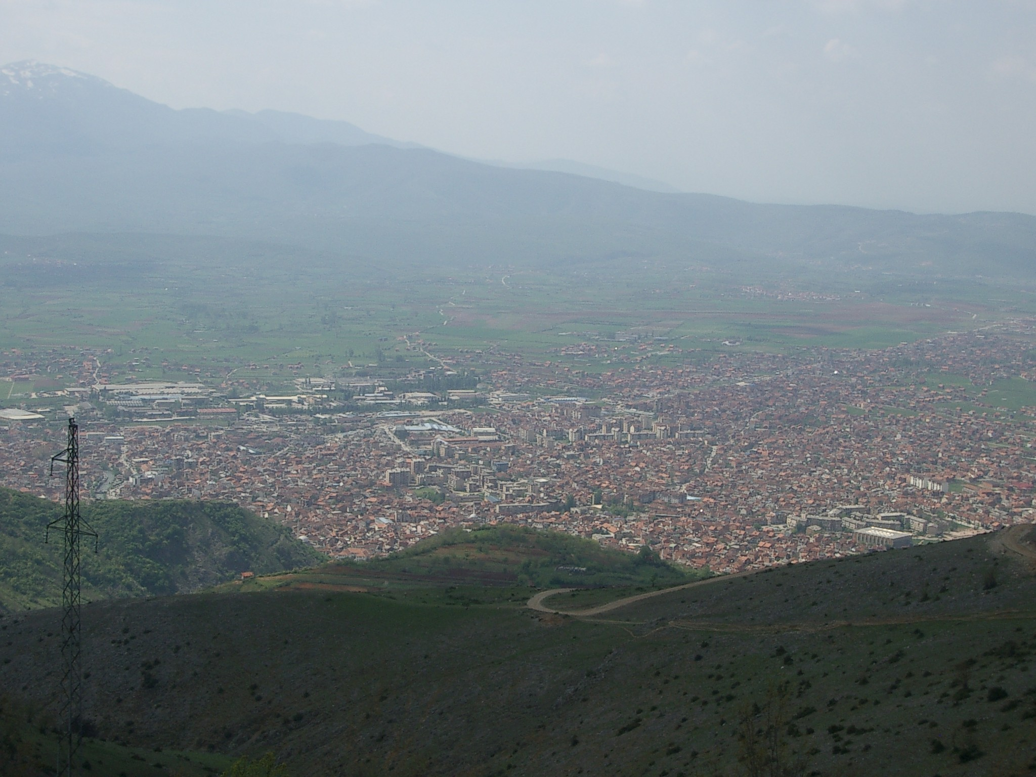 Beschreibung: Blick über Prizren, im Hintergrund der Pashtrik Quelle: fotographiert Sommer 2004 Fotograf / Zeichner: Anonym (für Public Domain)